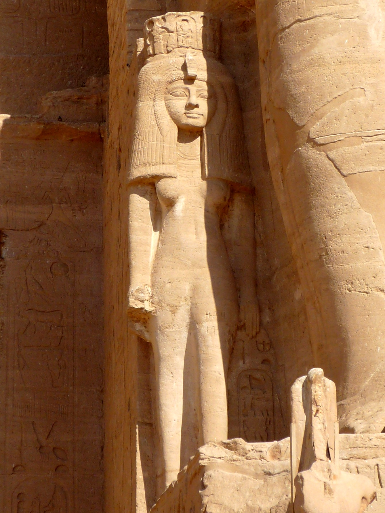 Nerfertari aux pieds du troisième colosse de Ramses II, grand temple d'Abou Simbel, Égypte